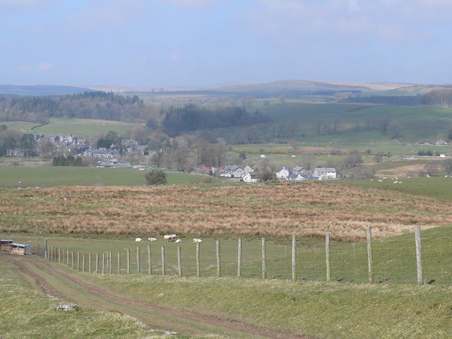 Pentrefoelas